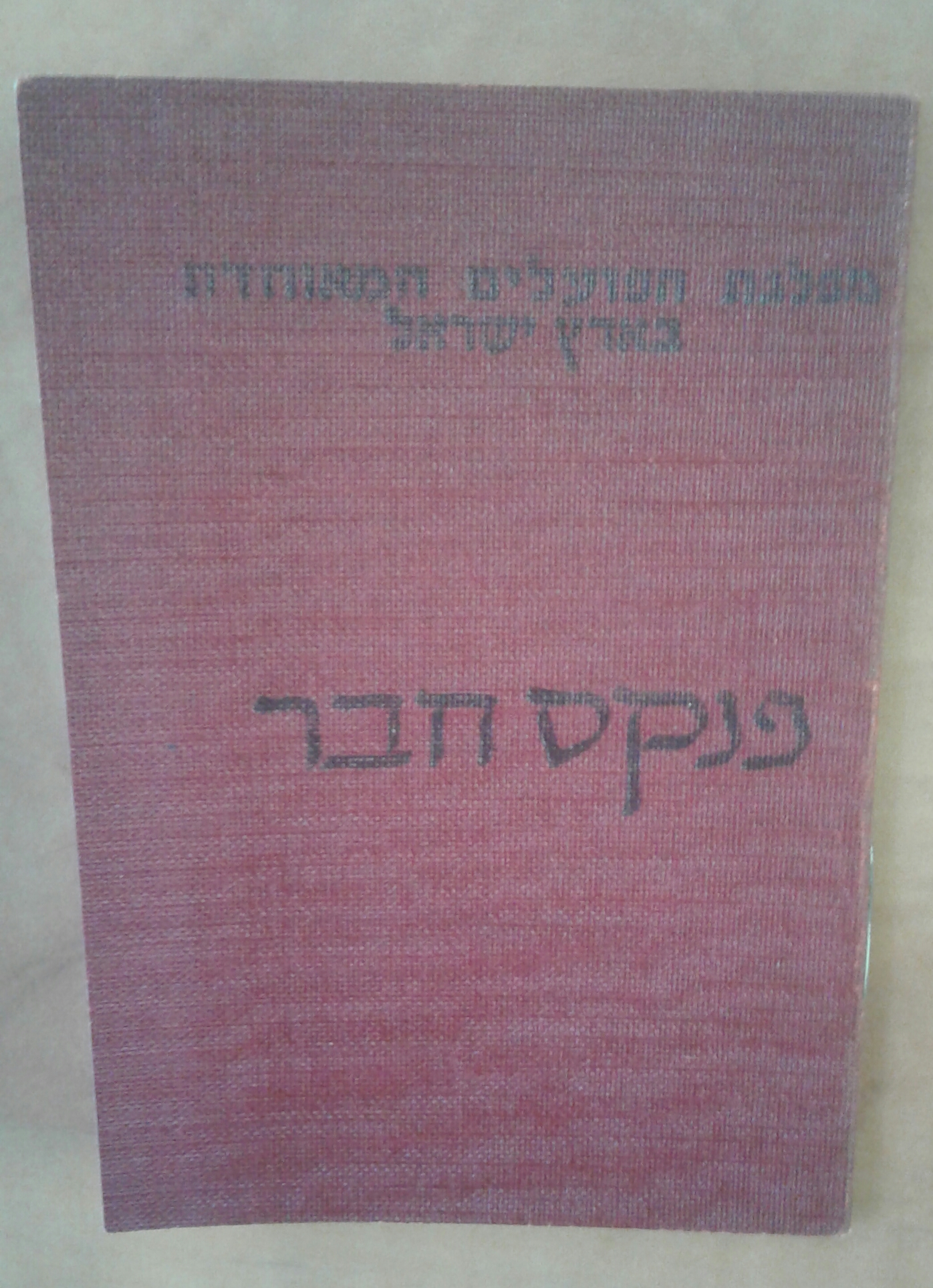 פנקס חבר במפלגת הפועלים המאוחדת (מפ"ם), ישראל, 1947